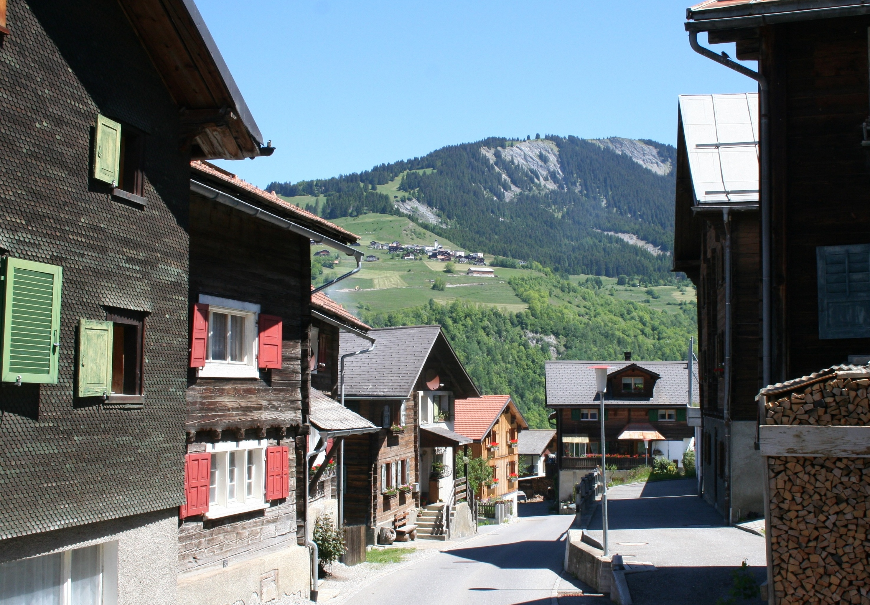 Pitasch, im Hintergrund Riein